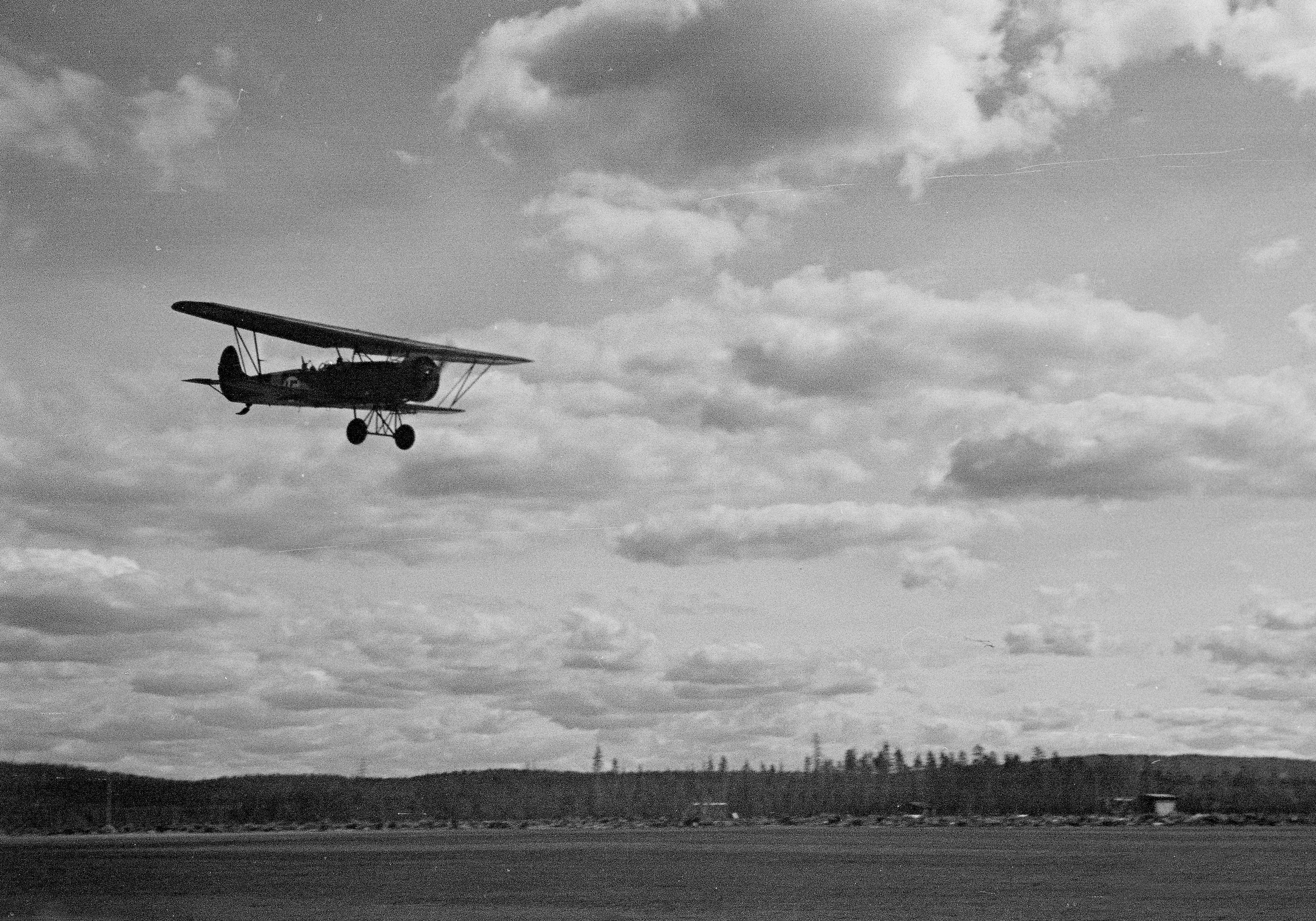 Tiedustelukone nousee ilmaan. (Kuvassa on Fokker C.VE). Kuvauspaikka: Tiiksjärvi